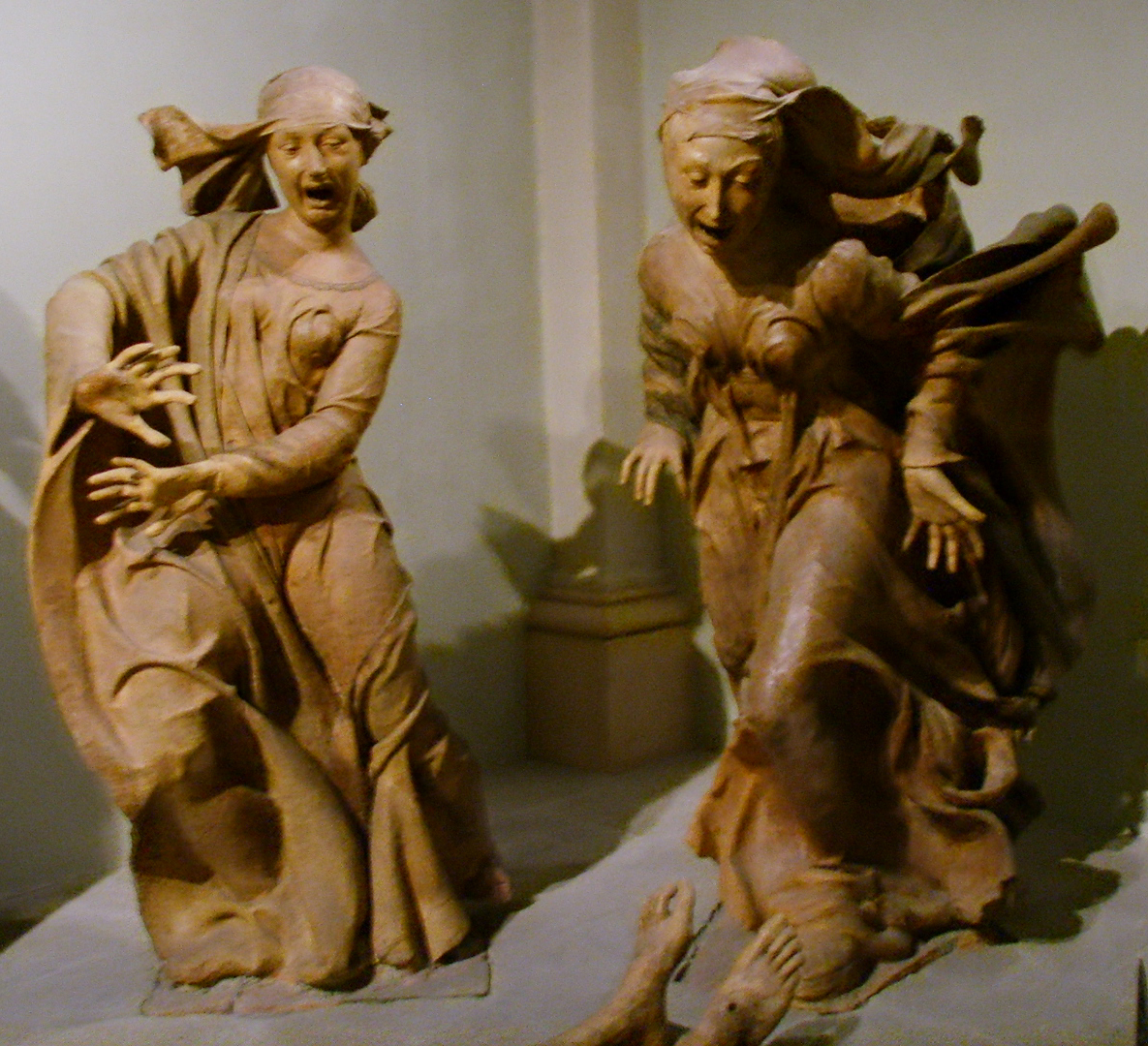 Niccolò dell'arca, Compianto sul Cristo morto, Chiesa di S. Maria della vita, Bologna